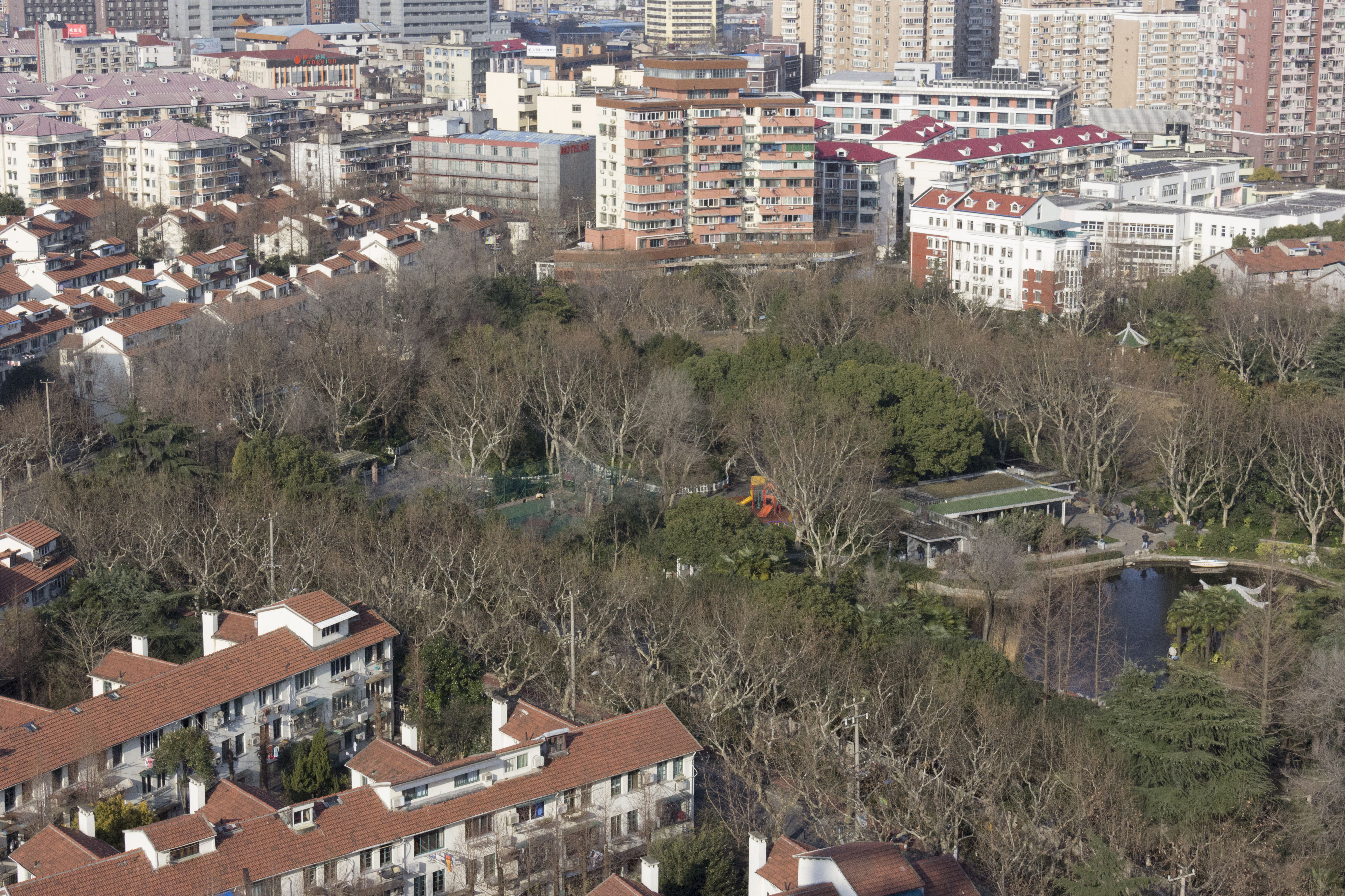 曹杨公园全景，摄于2016年1月23日。